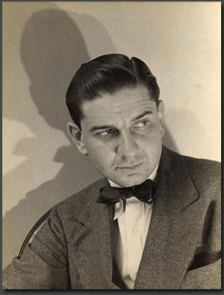 Чарльз Аддамс